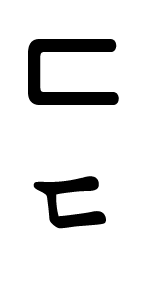 Korean Alphabet ㄷ(di.geut)